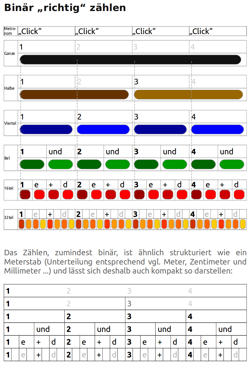 Rhythmus-Zählen Pyramide/Baum nur binär Matrix (ohne Noten)